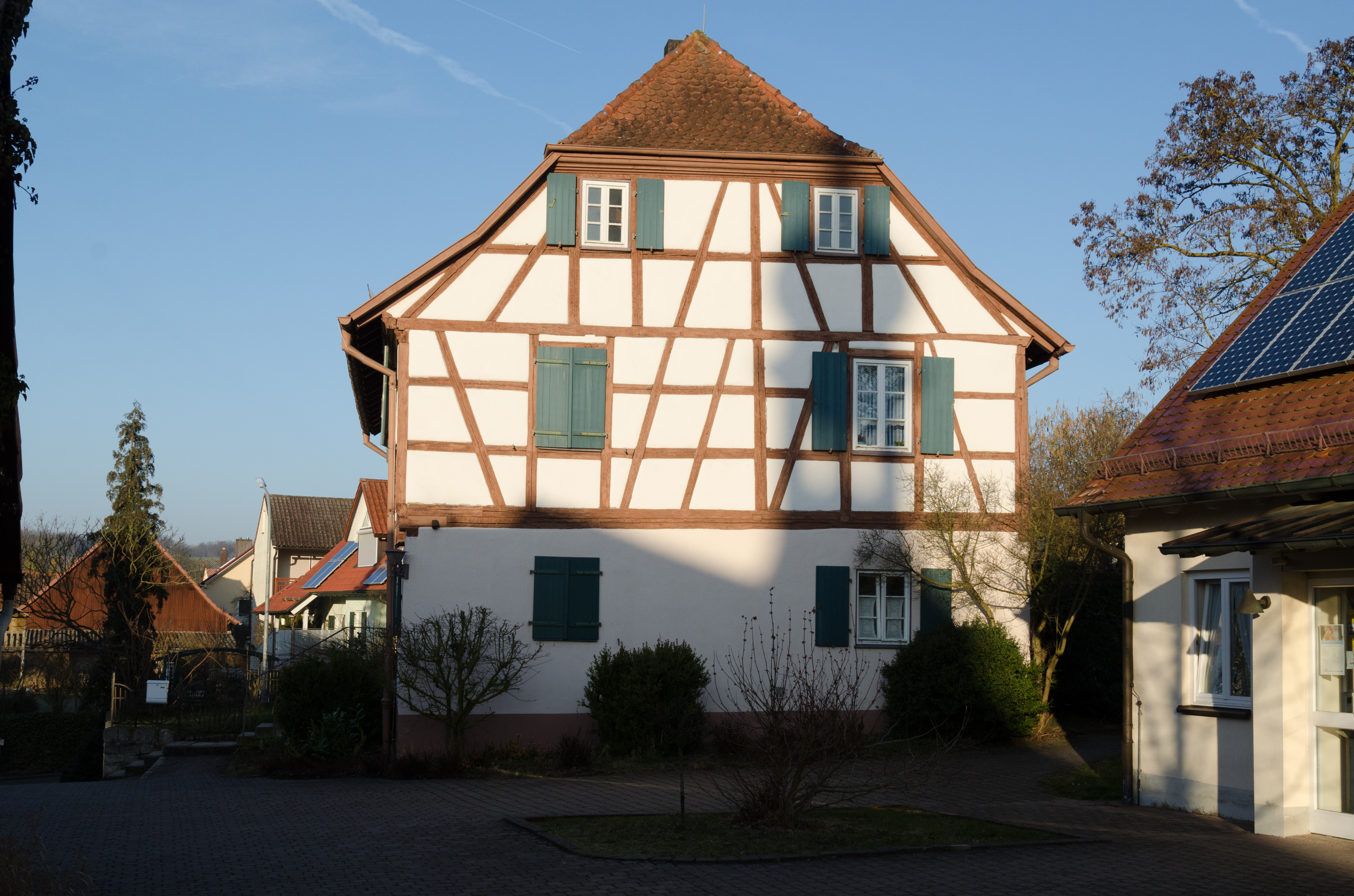 Aubstadt, Milzgrundstraße 10